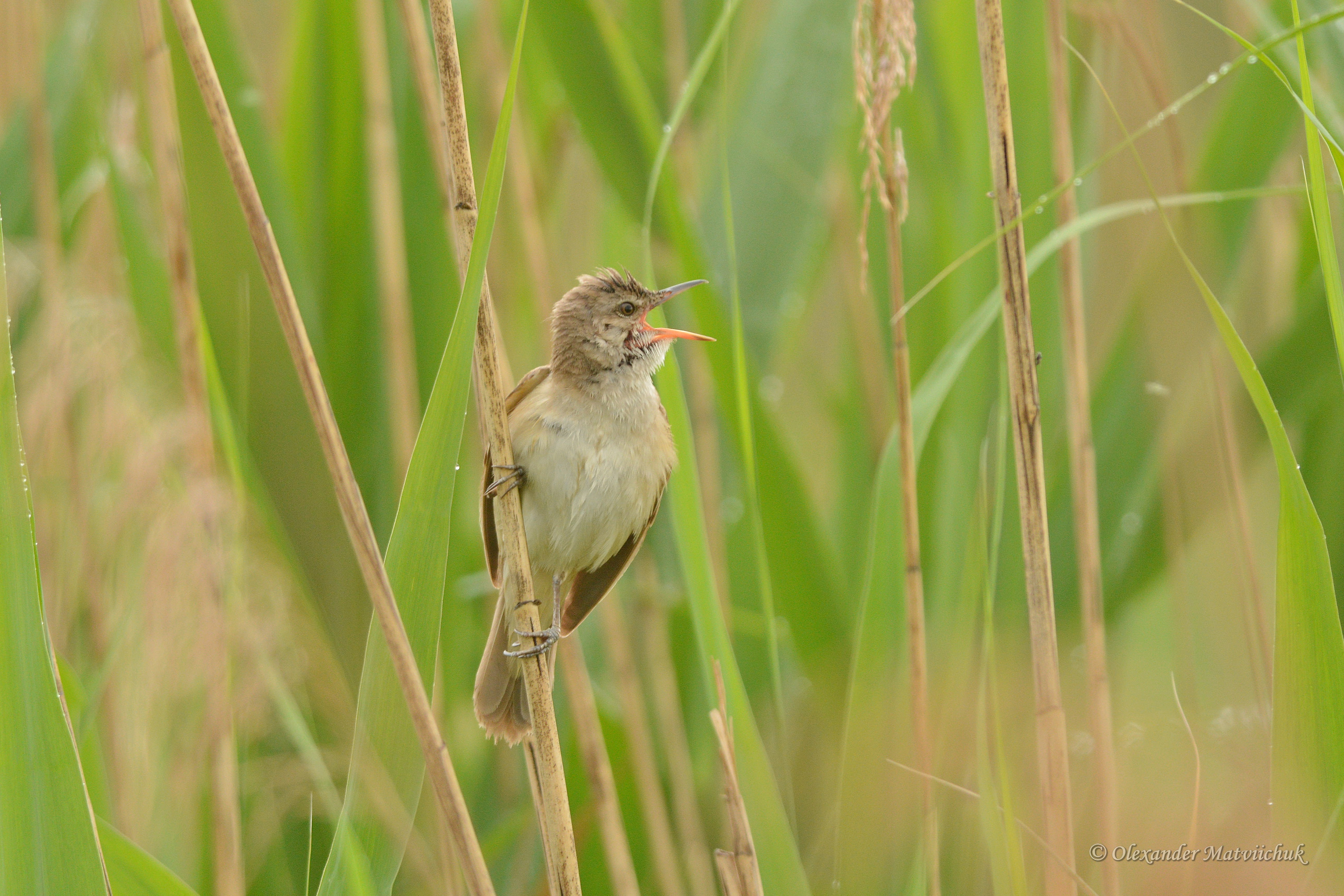 Згарський, Літинський р-н, околиці с. Микулинці